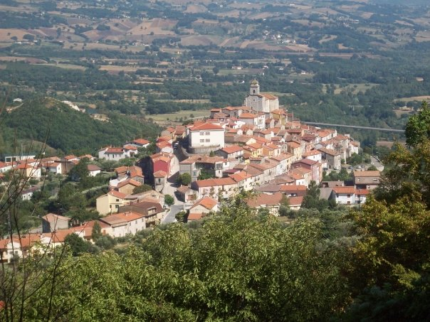 Vista di Sassinoro